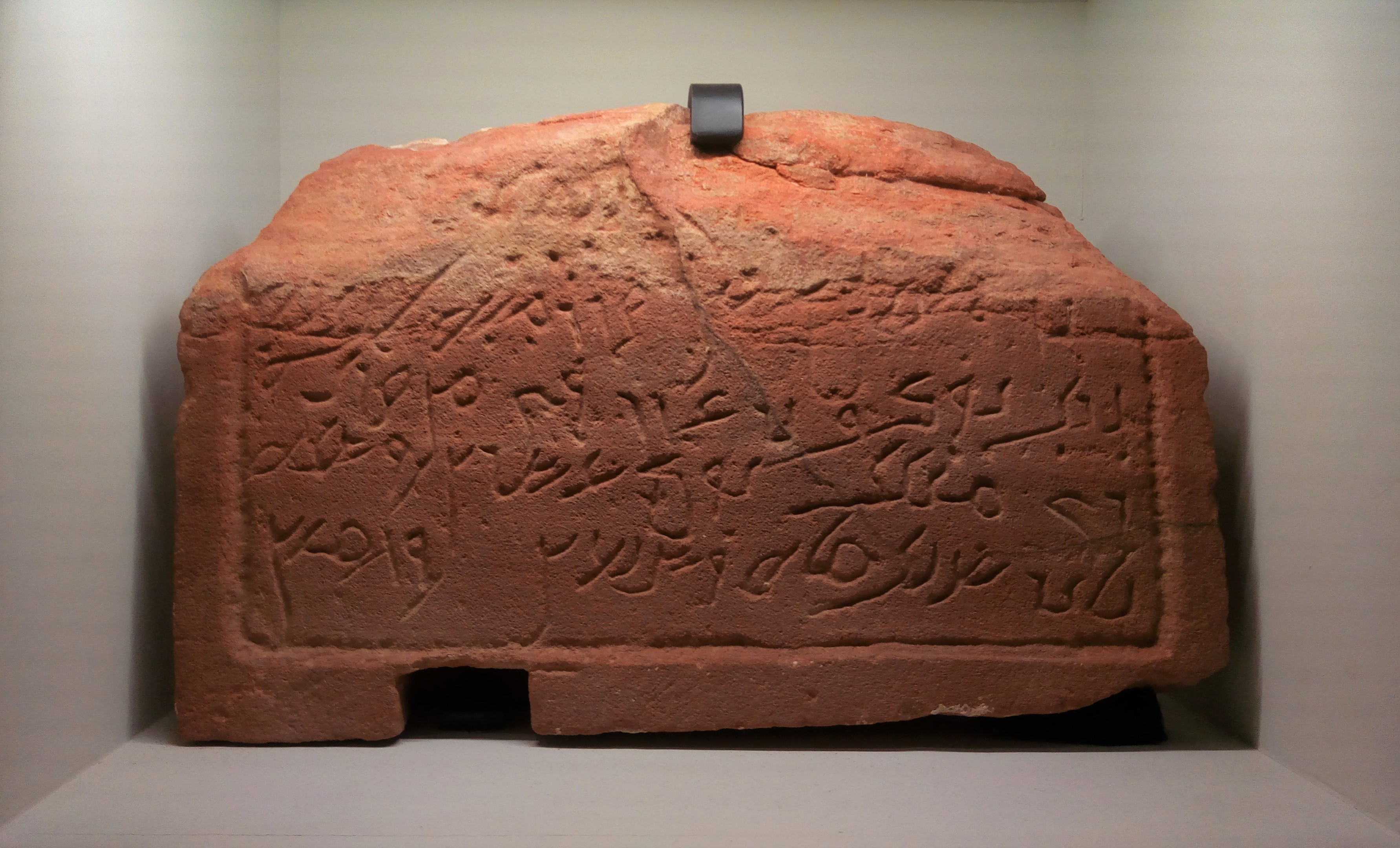 Inscription funéraire en caractères nabatéo-arabes, Al-'Ula, daté de 280. Sur un bloc en grès rouge. Présenté à l'Institut du Monde Arabe pour l'exposition sur Al-'Ula, prêt du Musée du département d'archéologie de Riyad, université du roi Saud. Traduction de l'inscription : "šlm pour le tombeau de R[ammânat] son épouse, la fille de Youssef fils de 'Irâr, qui est de Qaryâ, morte en l'an 26 de Iyâr (avril) l'an cent soixante quinze [de la Province d'Arabie]." Cette inscription est l'une des plus anciennes connues en alphabet "nabatéo-arabe", écriture de transition entre l'alphabet nabatéen et l'alphabet arabe.